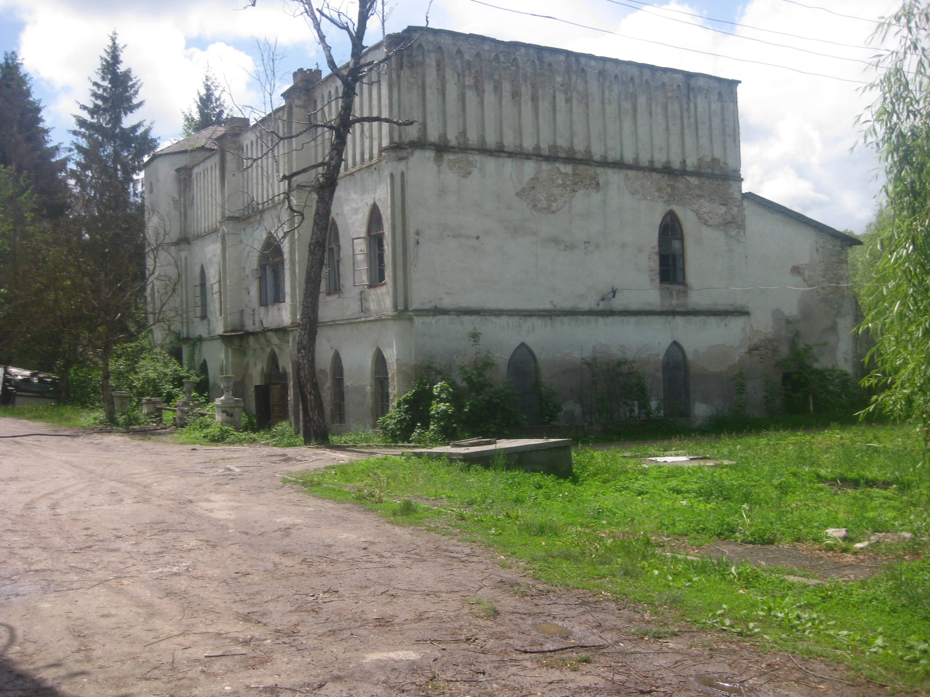 Особняк цукрозаводчика, Вищеольчедаїв, вул.Ковальського,32